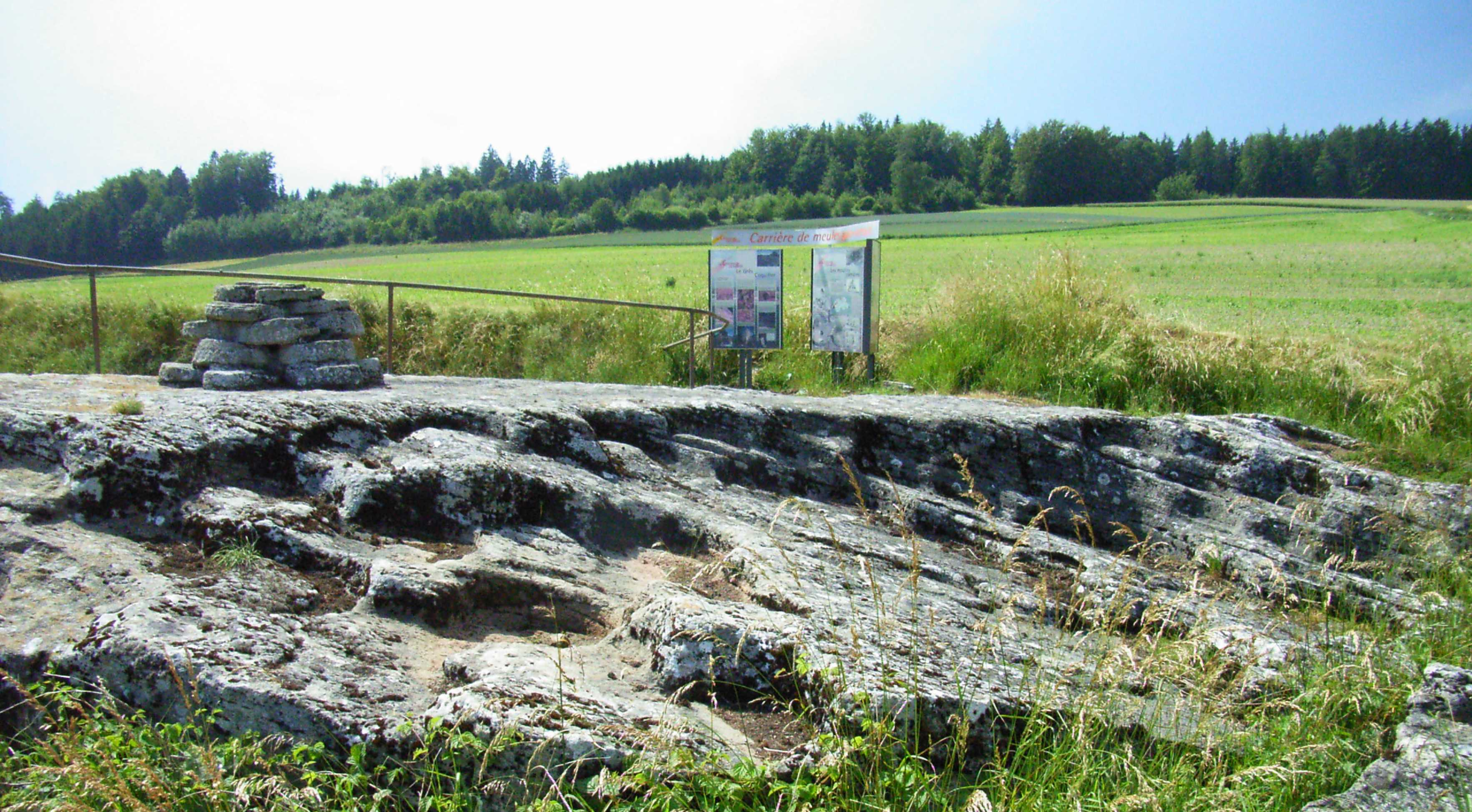 gallo-römischer Steinbruch in Chavannes-le-Chêne / VD